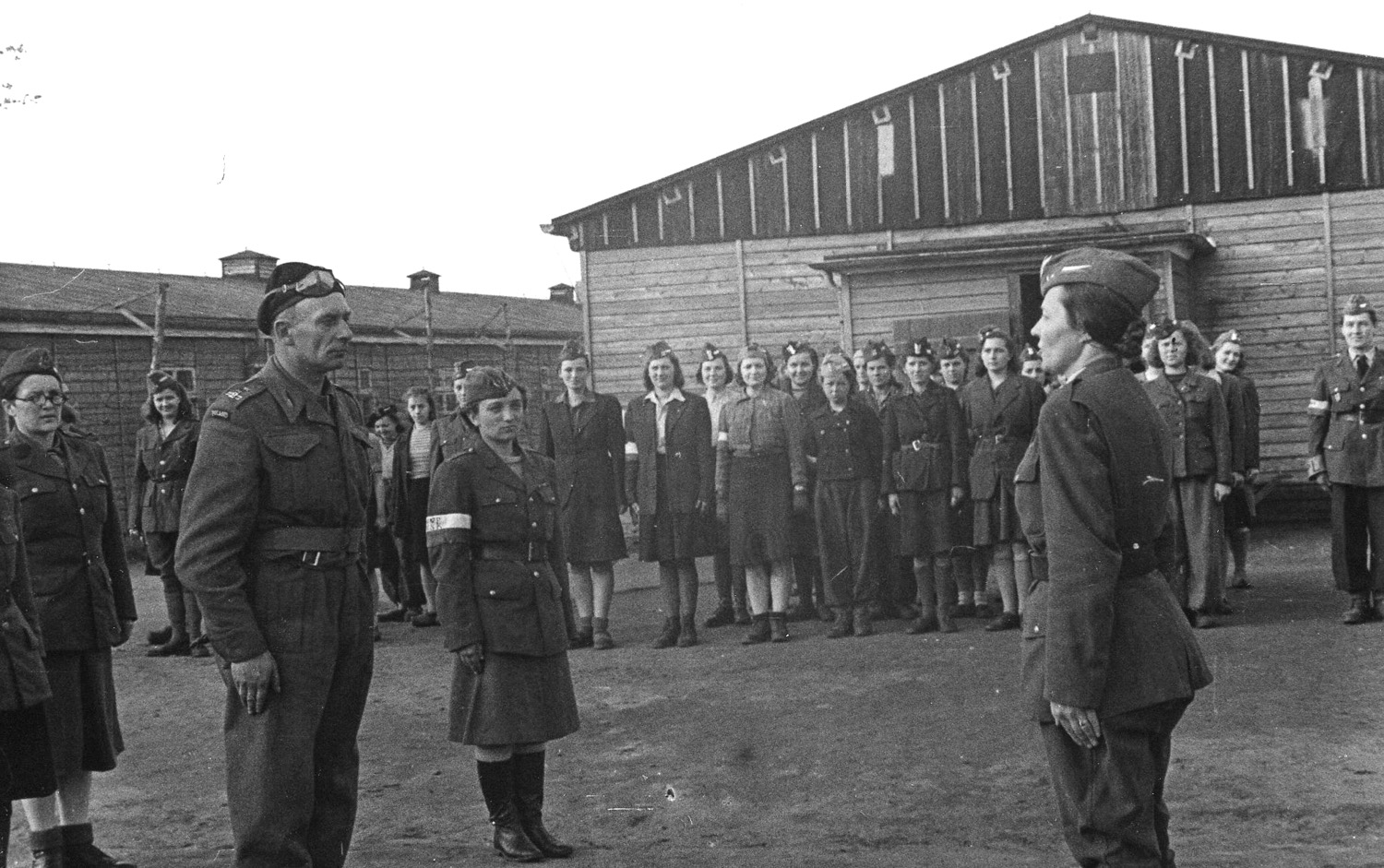 Wyzwolenie stalagu w Oberlangen przez żołnierzy 1 Dywizji Pancernej gen. Maczka Liberation of the Oberlangen POW camp for women